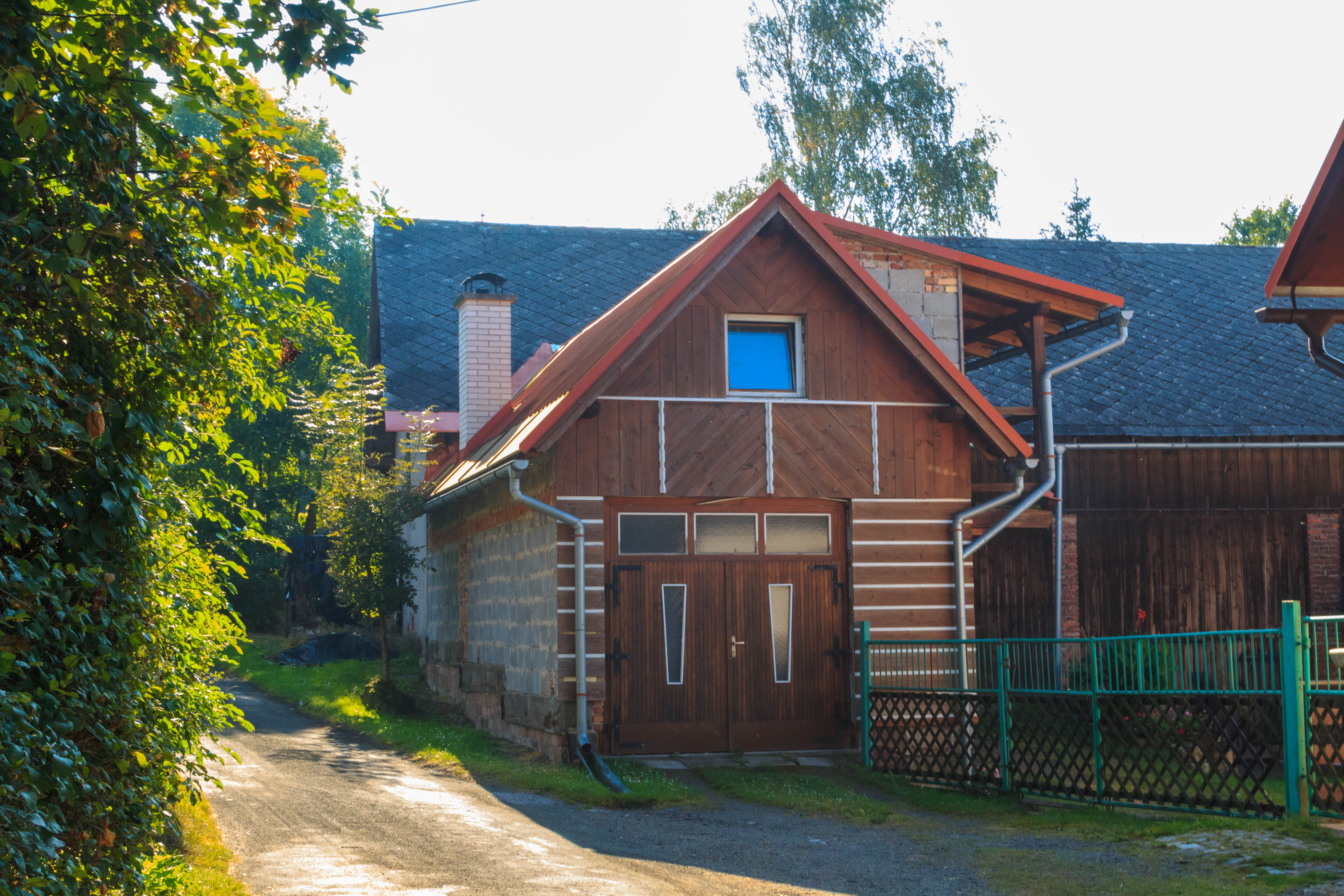 Rváčov u Lomnice nad Popelkou - čp. 1